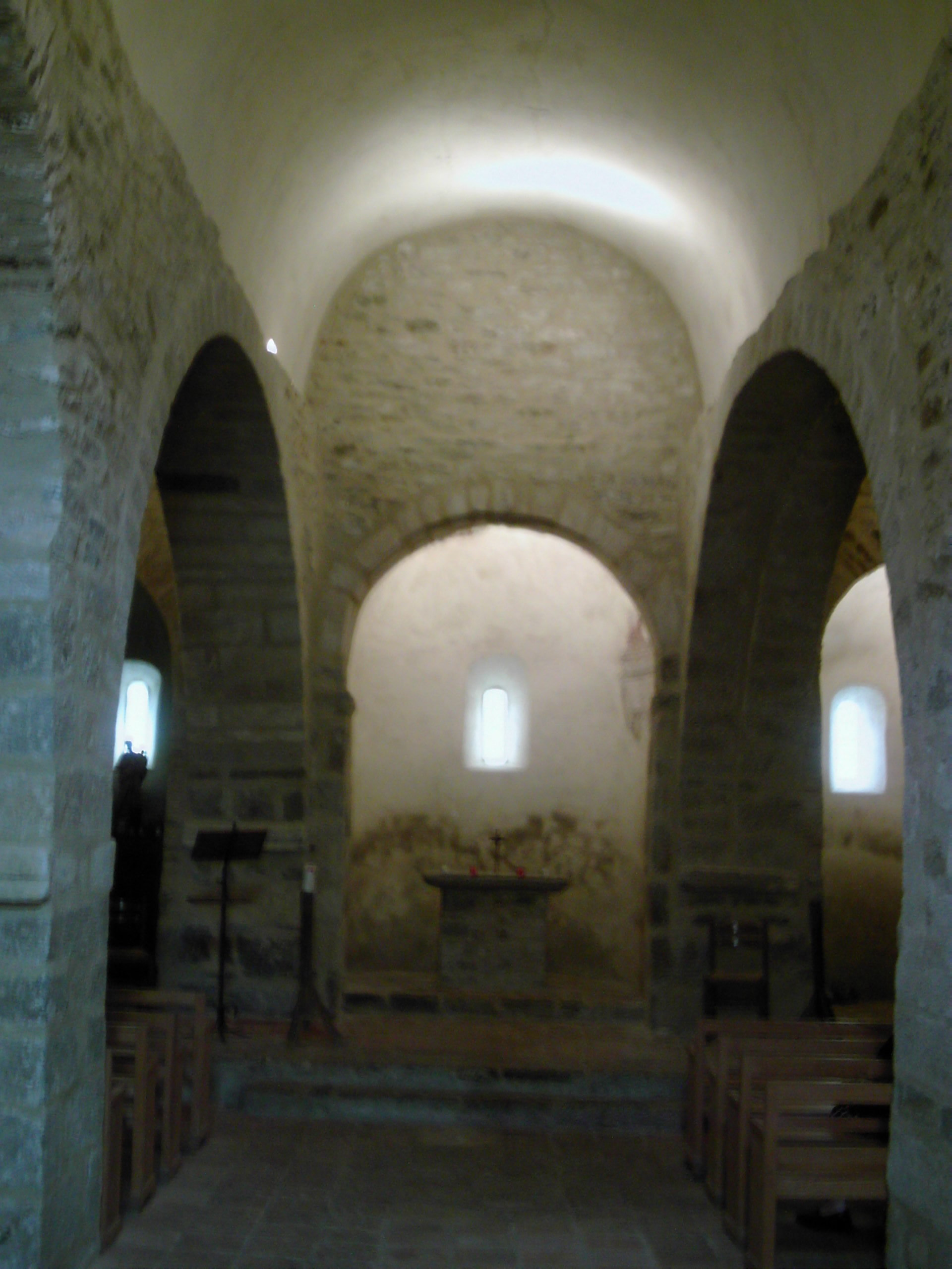 nef de l'église